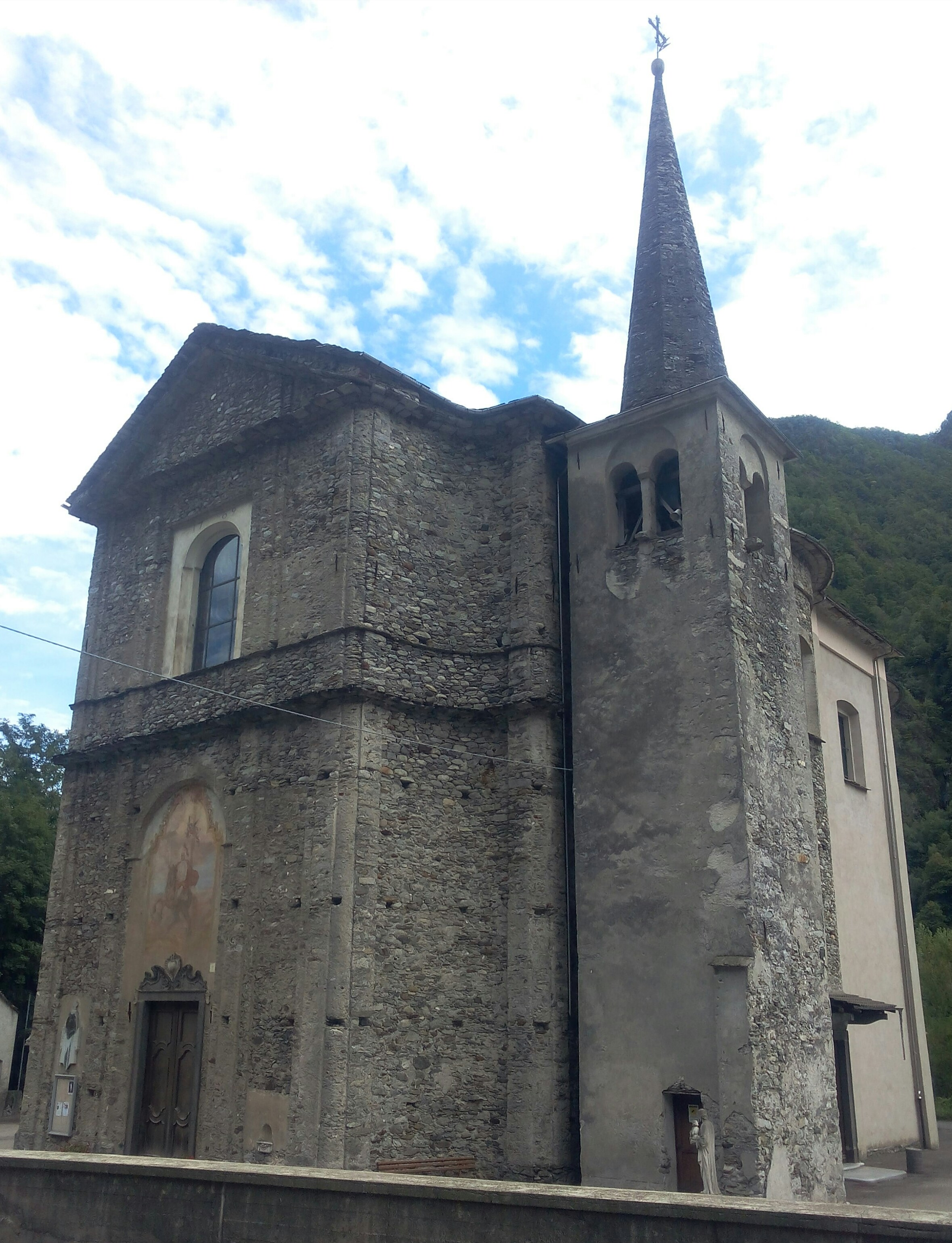 Vocca (VC): parrocchiale di San Maurizio